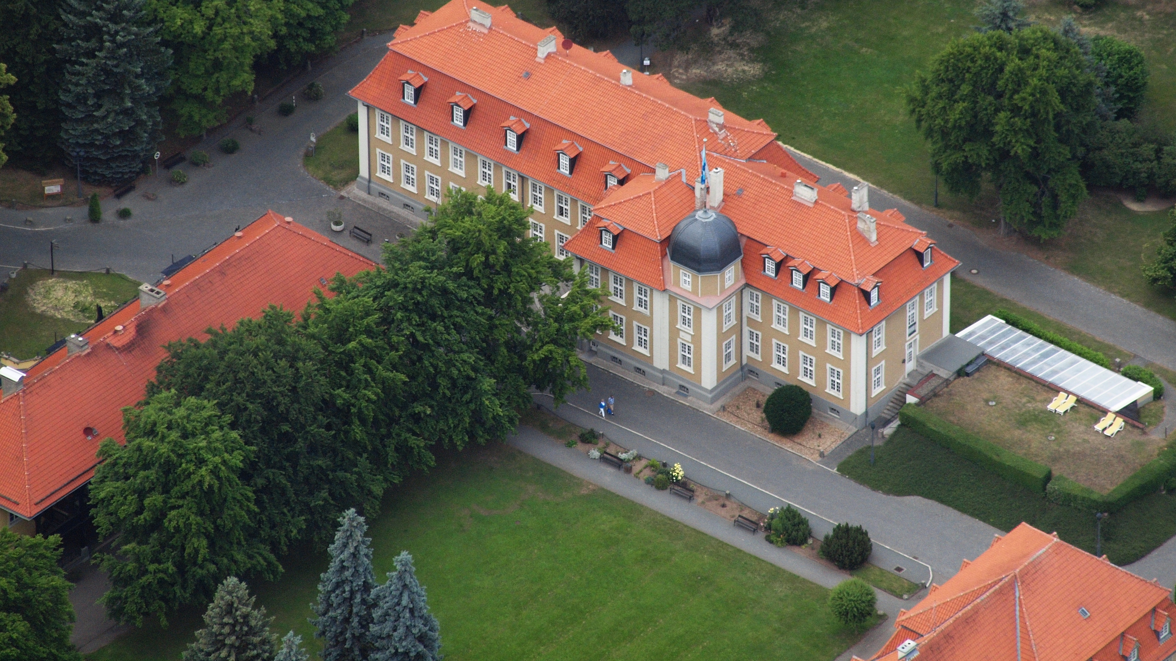 Schloss Meisdorf, Luftaufnahme (2015)